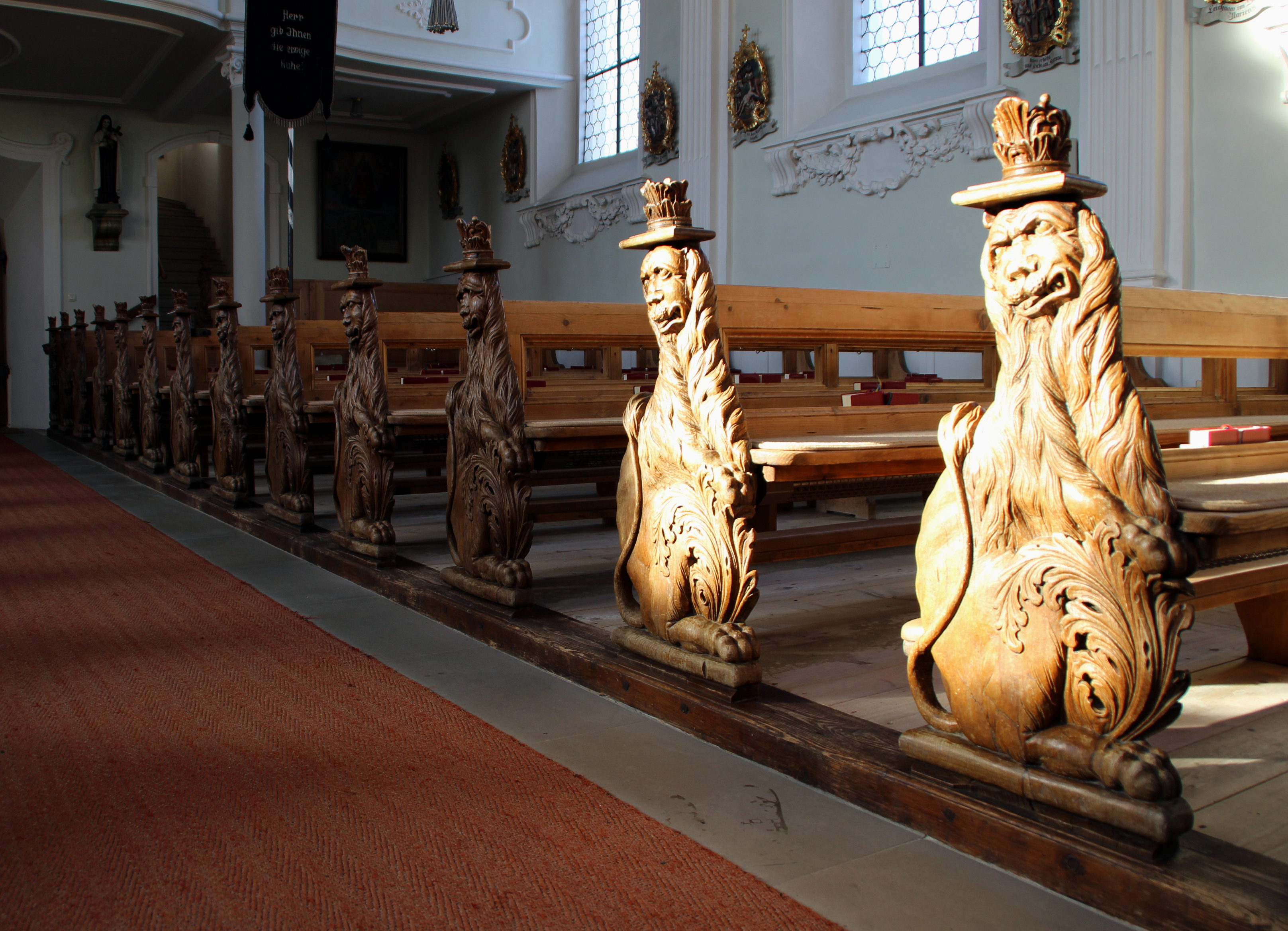 Katholische Pfarrkirche Mariä Himmelfahrt Saalbau mit eingezogenem Chor und nördlichem Turm mit Spitzhelm, Chor im Kern spätgotisch, Neubau von Frater Christoph Gessinger 1709/10, Turm 1874, Umgestaltung der Westfassade und Vorzeichen 1920/21; mit AusstattungThis is a photograph of an architectural monument.